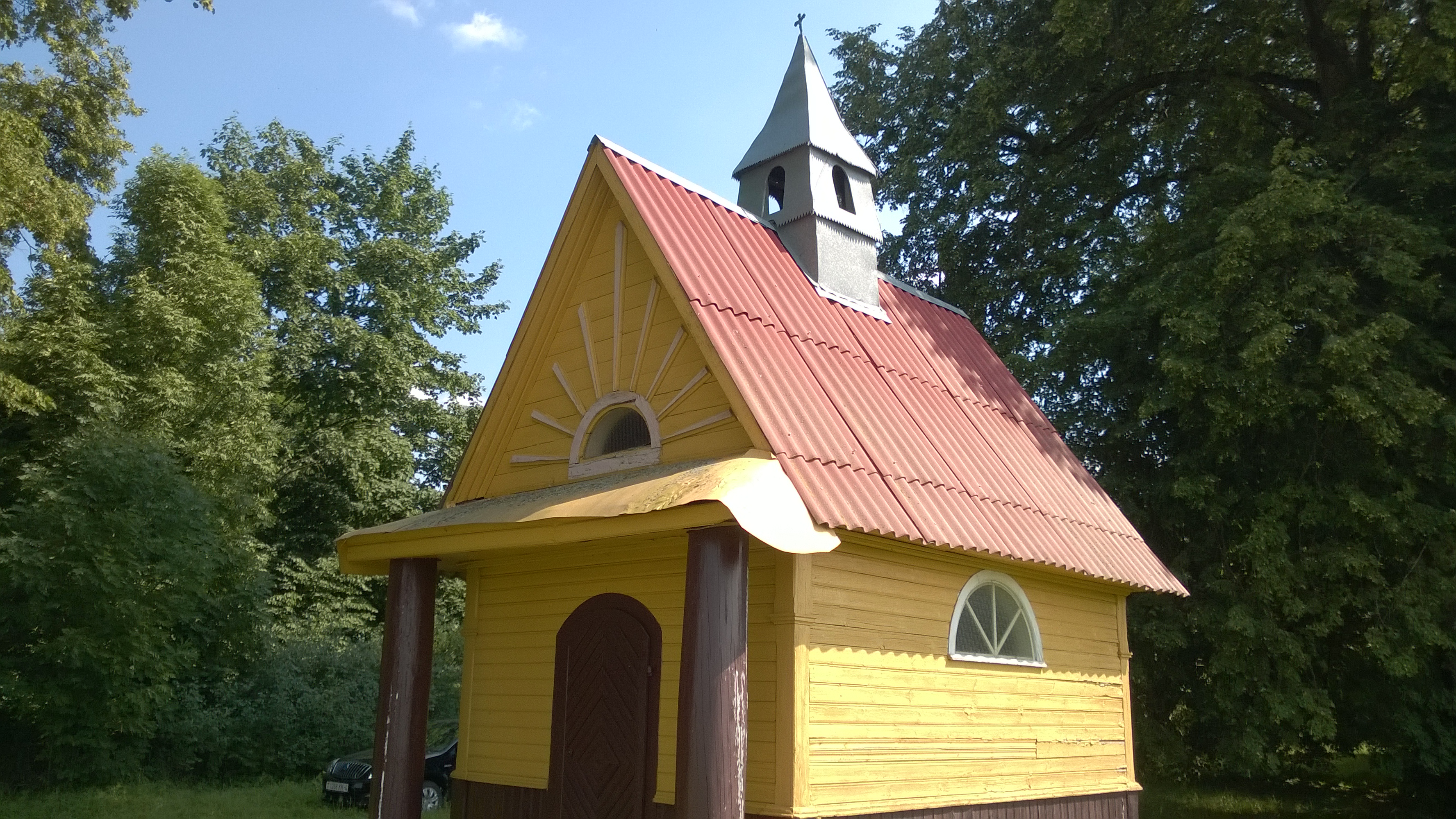 Моховичи, Belarus